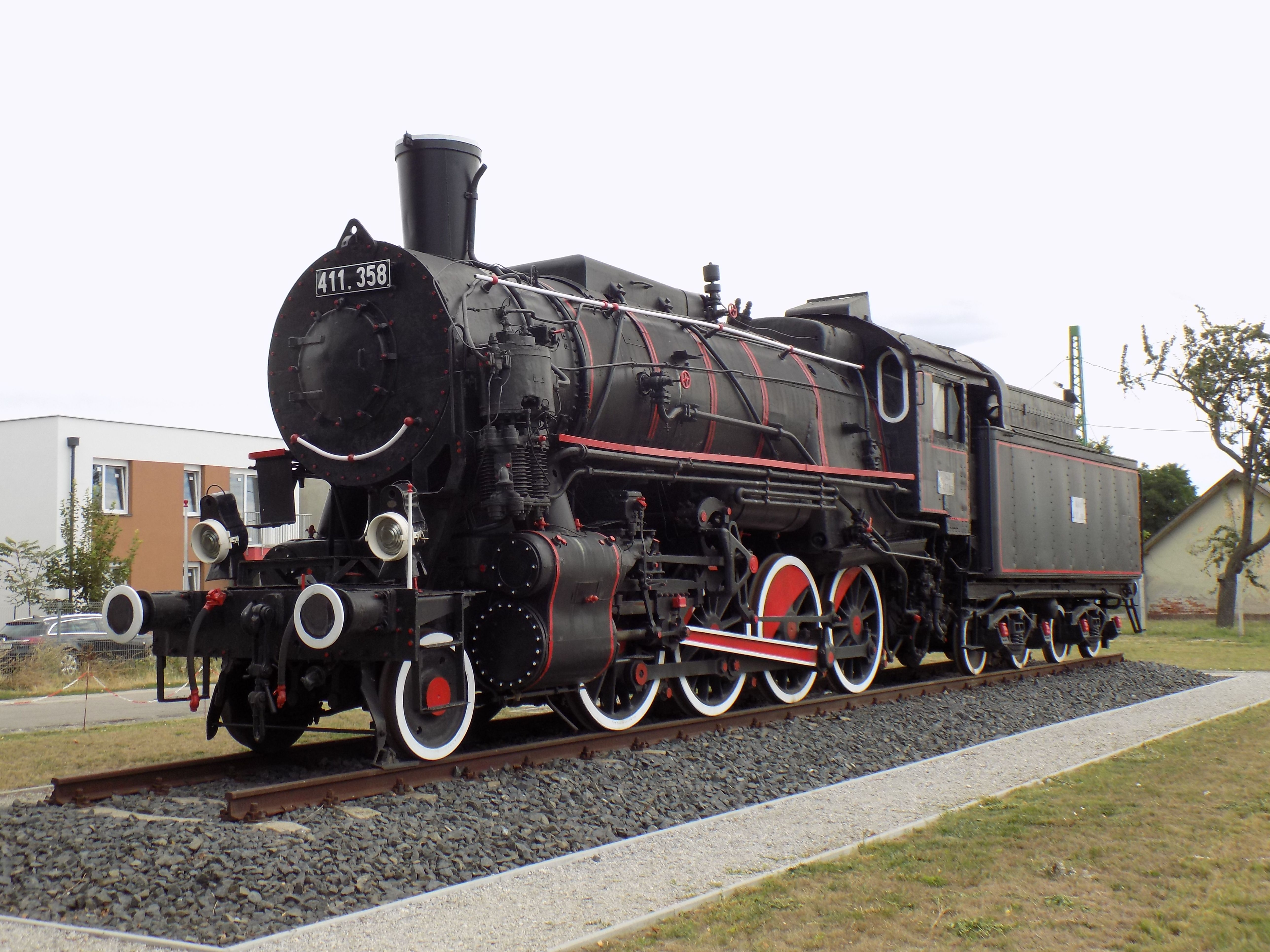 A felújított 411,358-as Truman gőzmozdony (MÁV 411 sorozat) Hegyeshalom állomáson